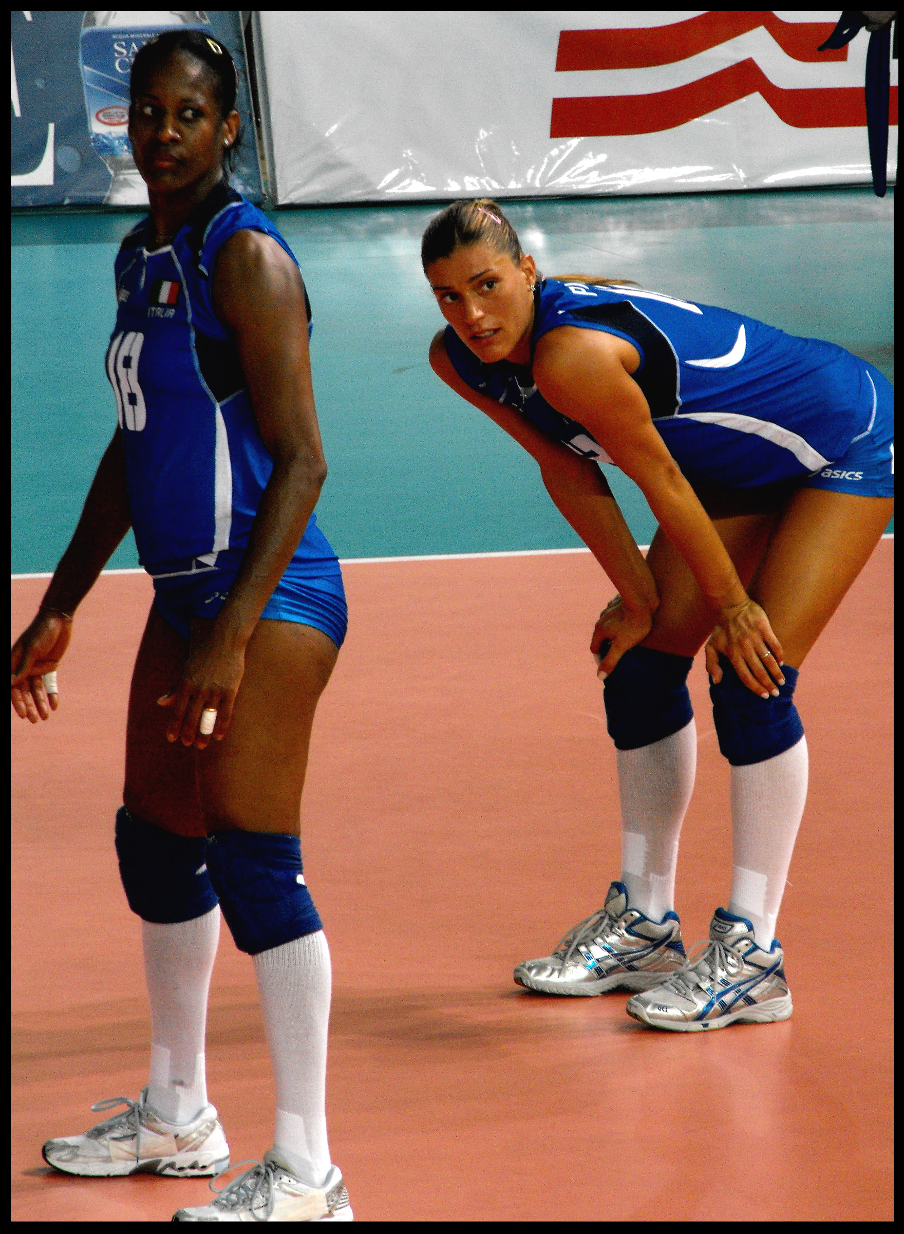 Taismary Aguero e Francesca Piccinini